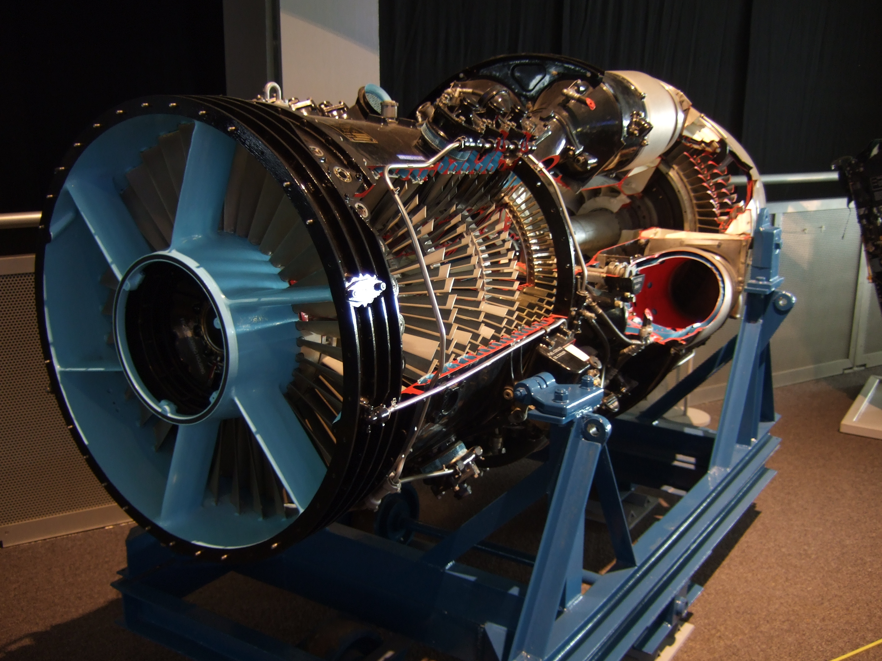 Jet engine